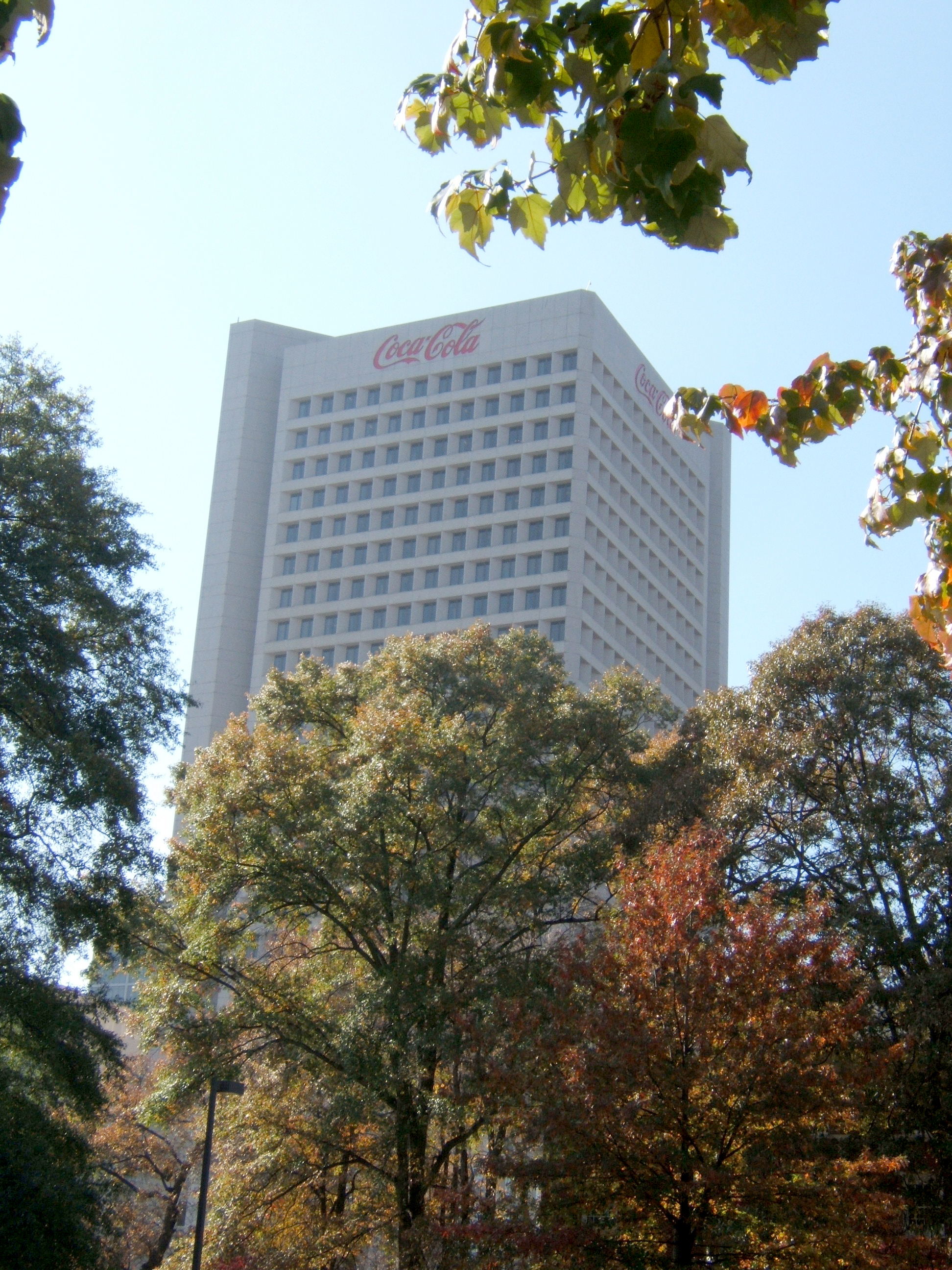 Le siège mondial de la compagnie Coca-Cola à Atlanta.